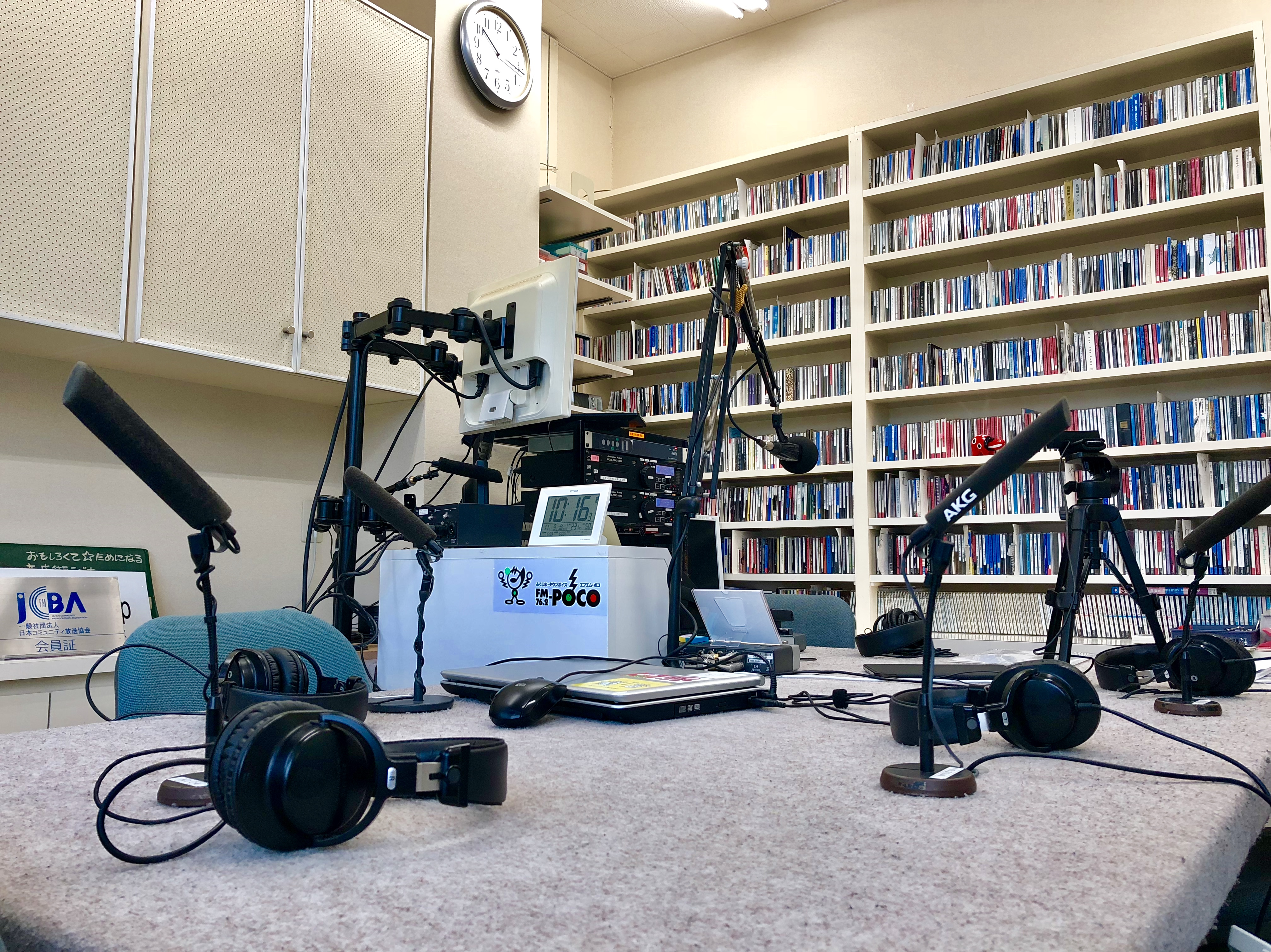 ＦＭポコ内観